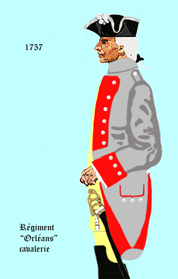 Uniform eines französischen Kavallerie-Regiments gemäß Verordnung von 1757